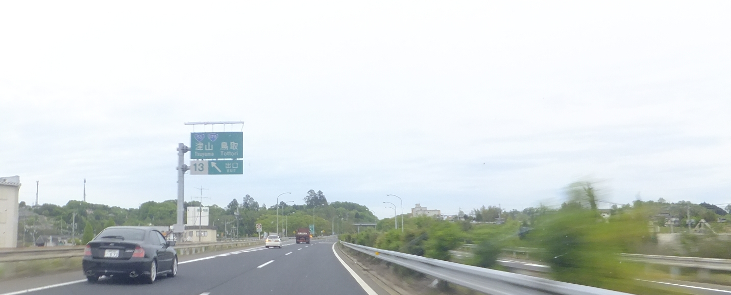 岡山県津山市押入 中国自動車道